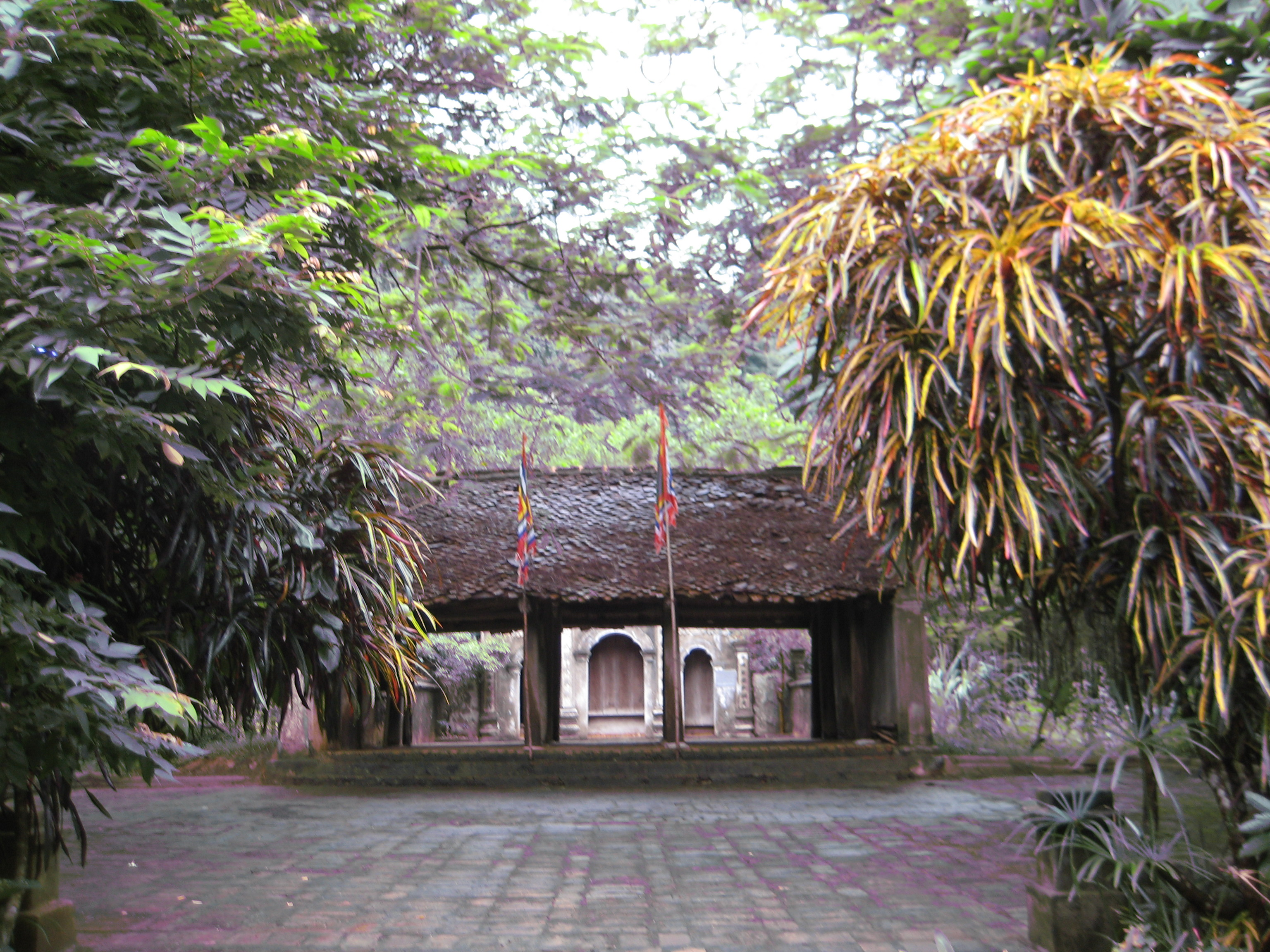 DongHoaLu3